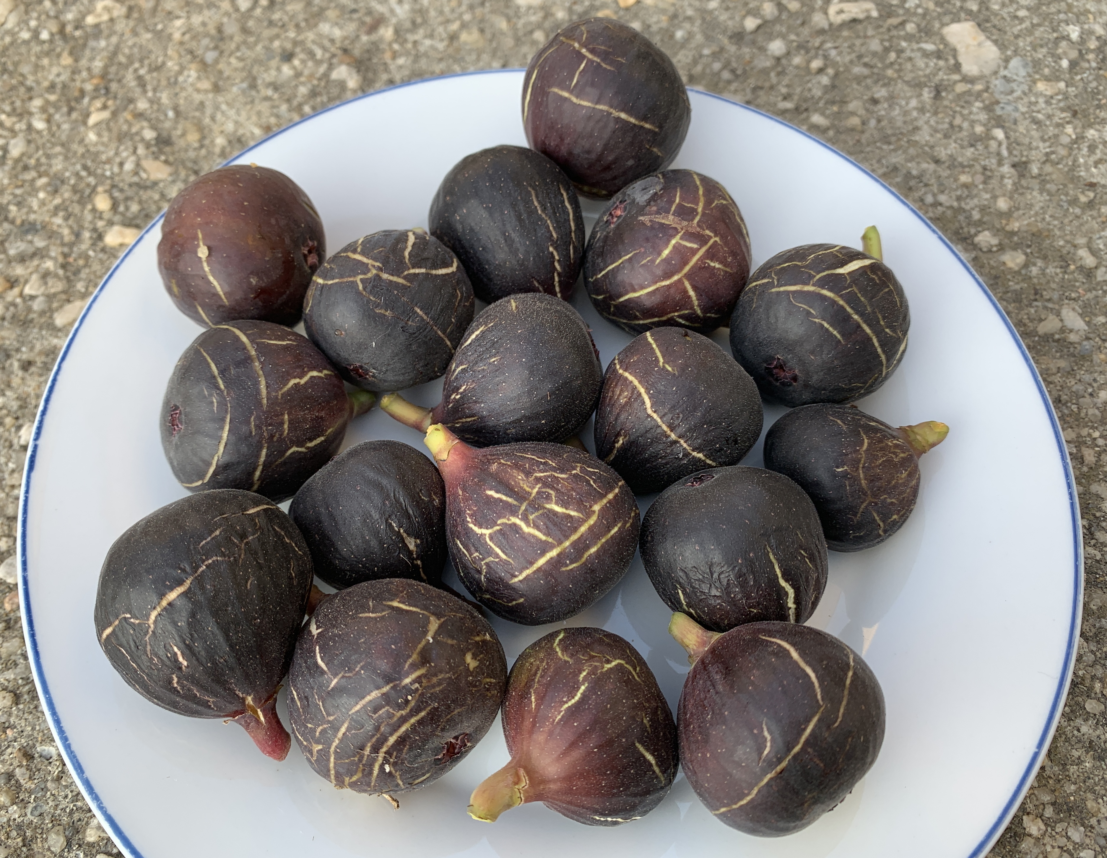 reife Früchte der Feigensorte "Ronde de Bordeaux", Kultur der Pflanzen im Freiland in Westsachsen